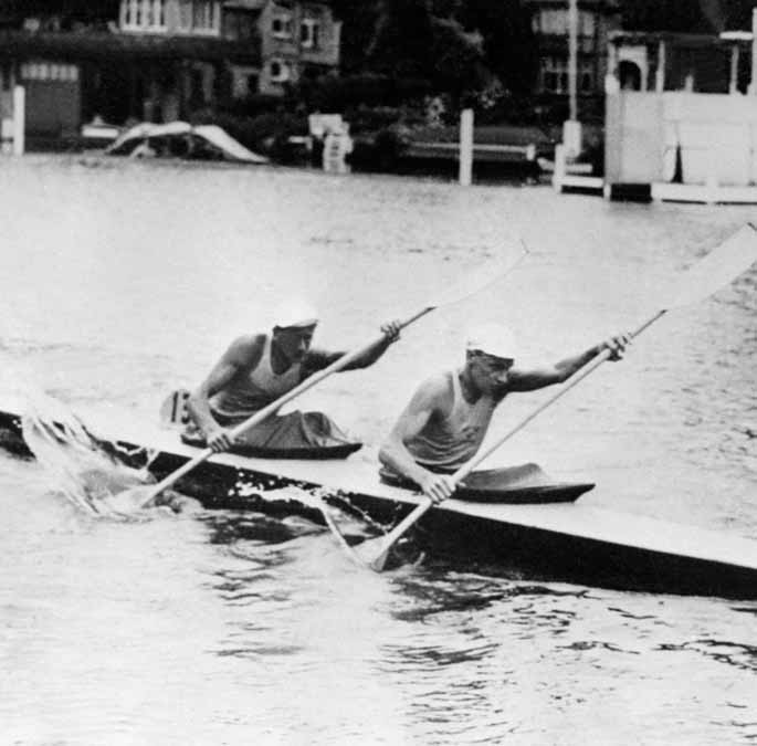 Hans Wetterström and Gunnar Åkerlund